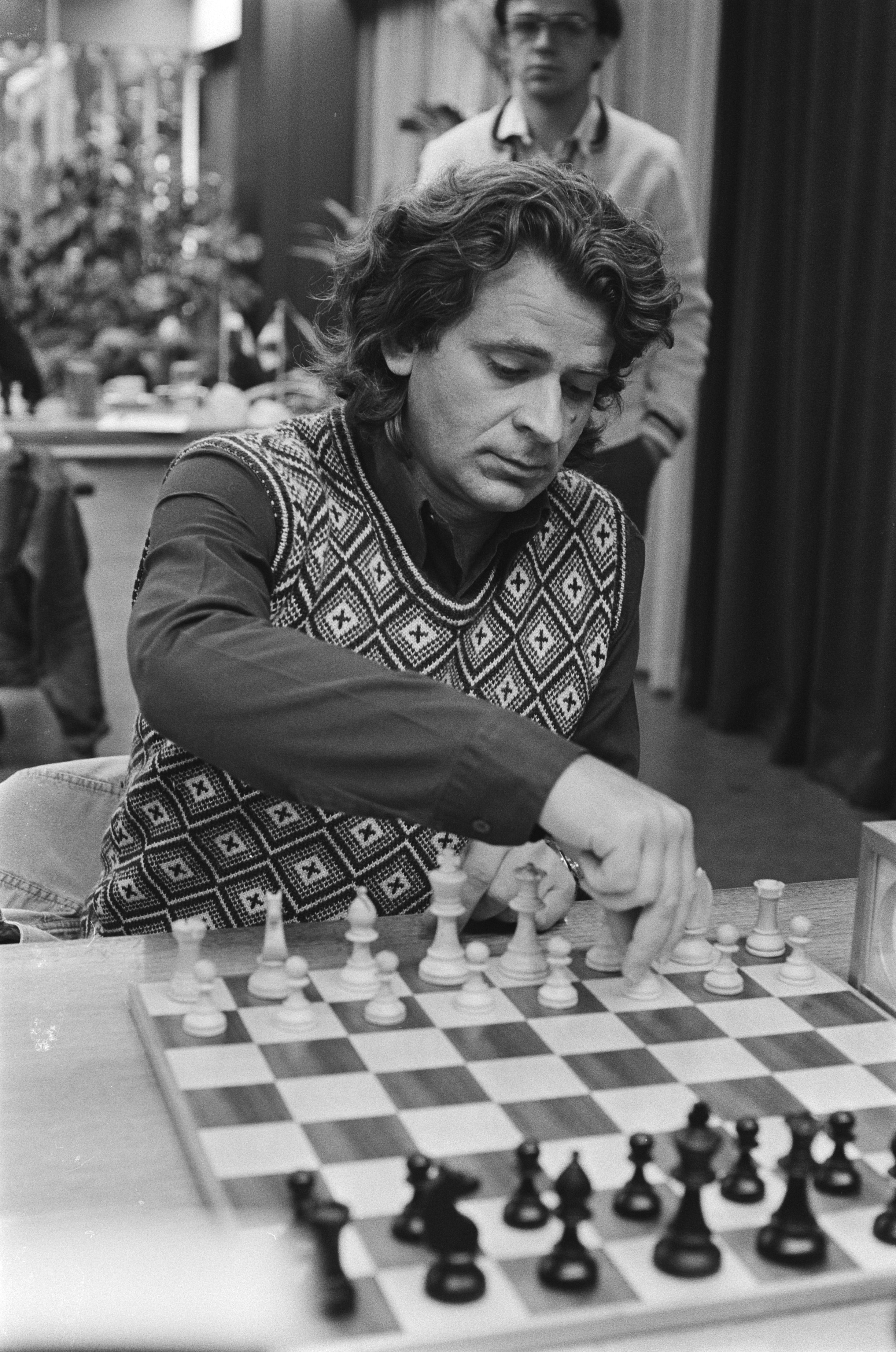 Collectie / Archief : Fotocollectie Anefo Reportage / Serie : [ onbekend ] Beschrijving : Interpolis schaaktoernooi 1e ronde; Boris Spasski Datum : 1 september 1978 Trefwoorden : portretten, schaken, sport Persoonsnaam : Spassky, Boris Fotograaf : Suyk, Koen / Anefo Auteursrechthebbende : Nationaal Archief Materiaalsoort : Negatief (zwart/wit) Nummer archiefinventaris : bekijk toegang 2.24.01.05 Bestanddeelnummer : 929-8810